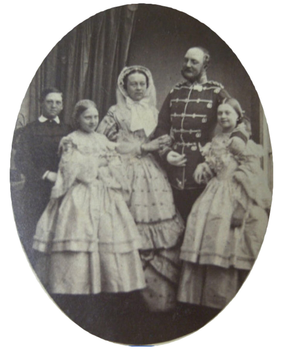 Georg V. von Hannover und seine Familie